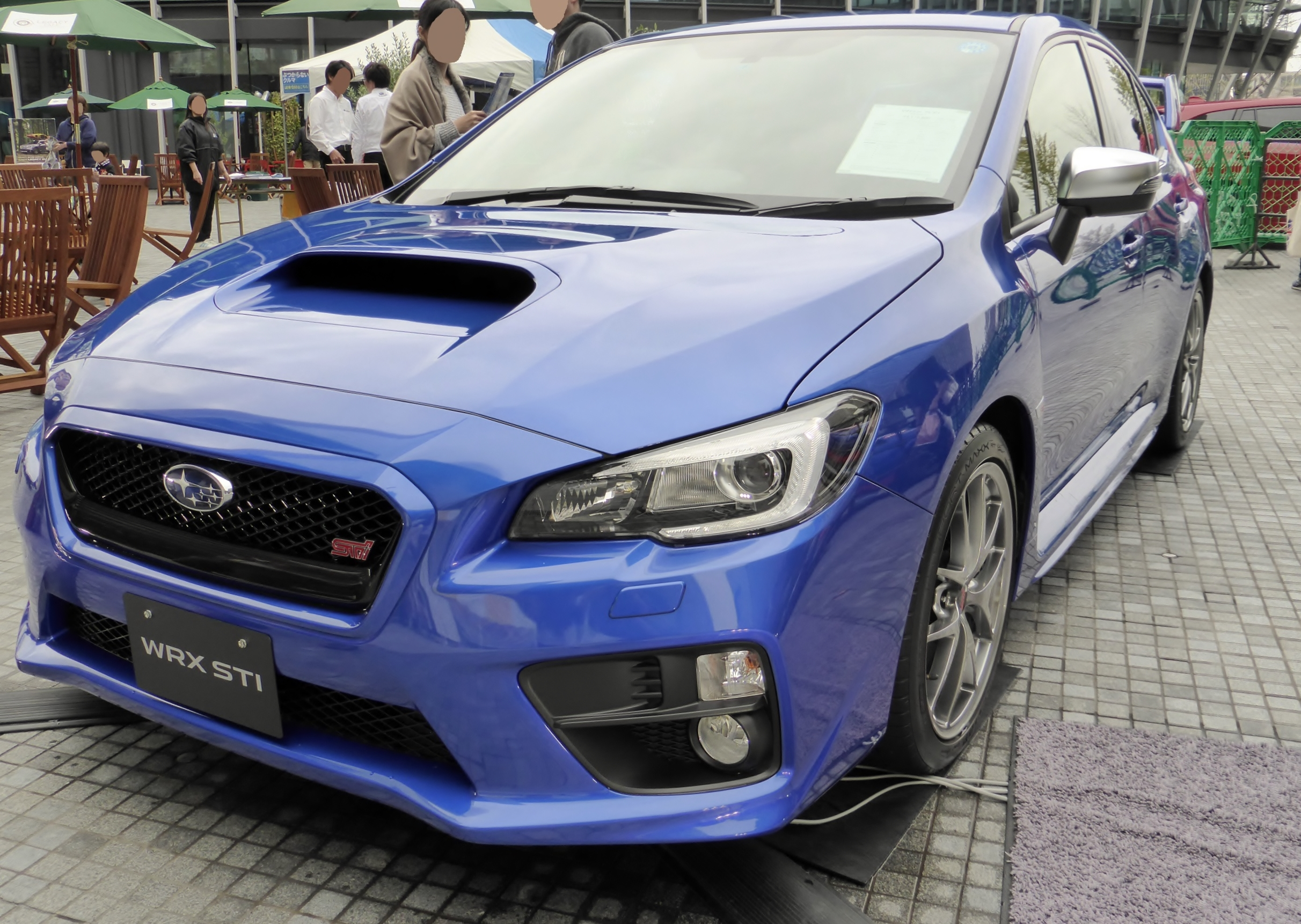 VAB型スバル・WRX STI タイプSをフロントから撮影。